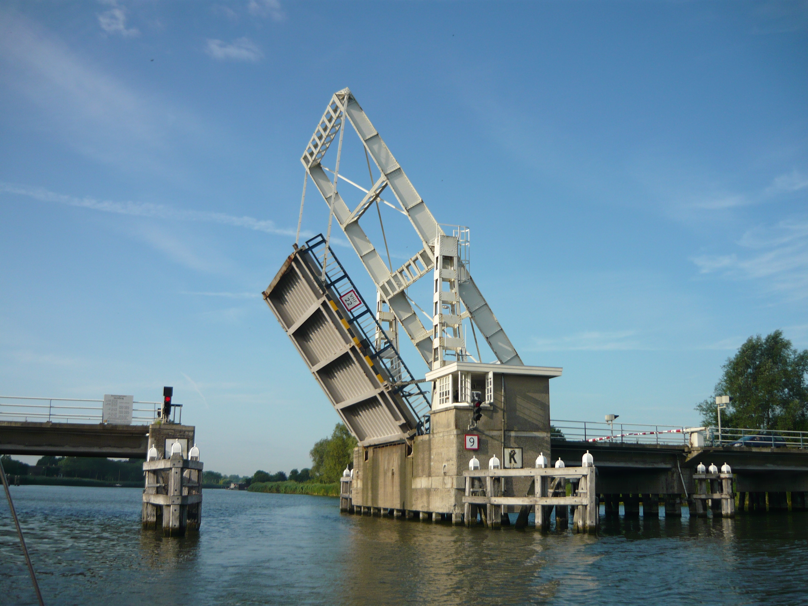 Vechtbrug bij Uitermeer op de kruising van de Utrechtse Vecht met de N236